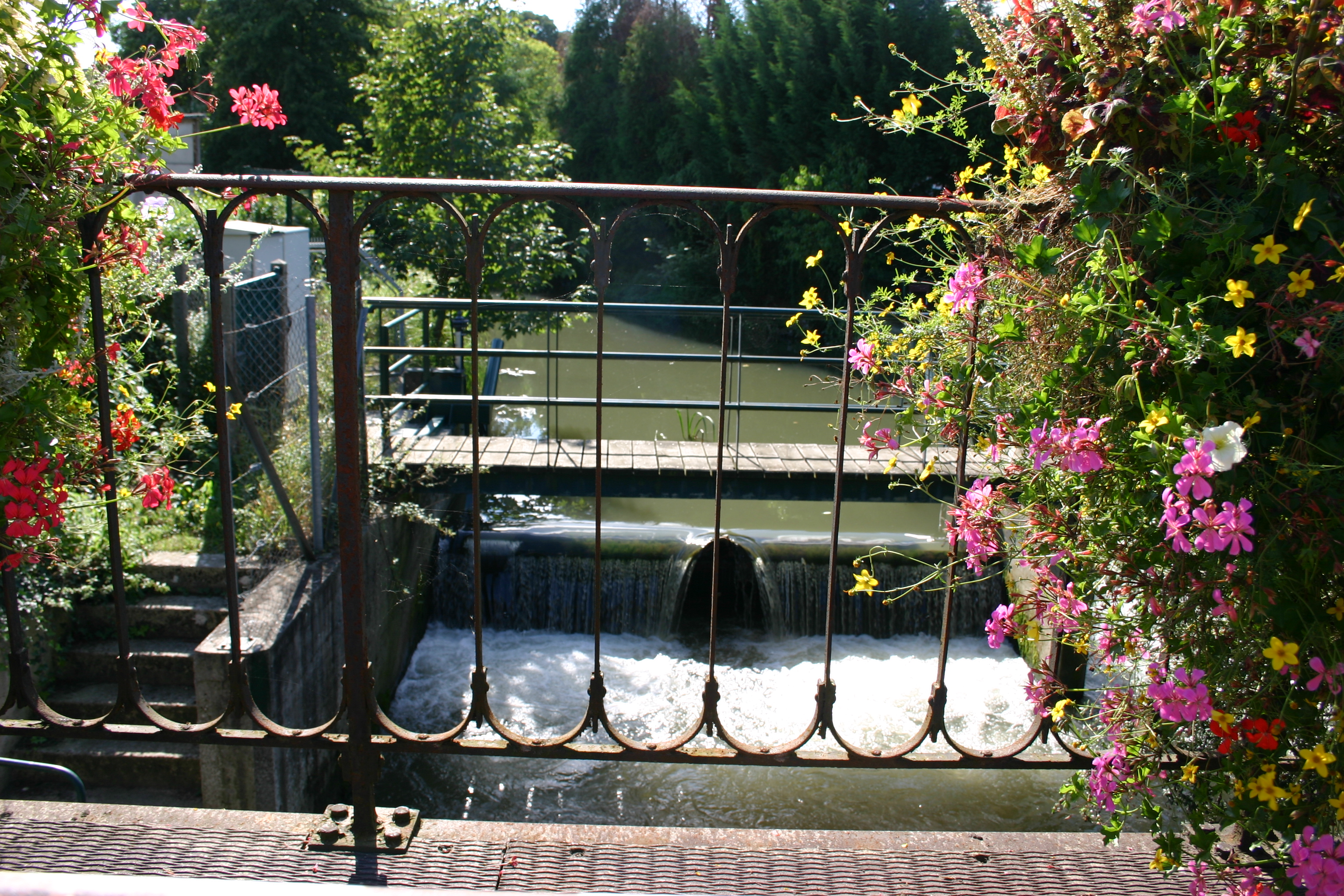 ©éréales Kille® ☺ 18 septembre 2005 à 19:30 (CEST) ©éréales Kille® ☺ 18 septembre 2005 à 19:30 (CEST)